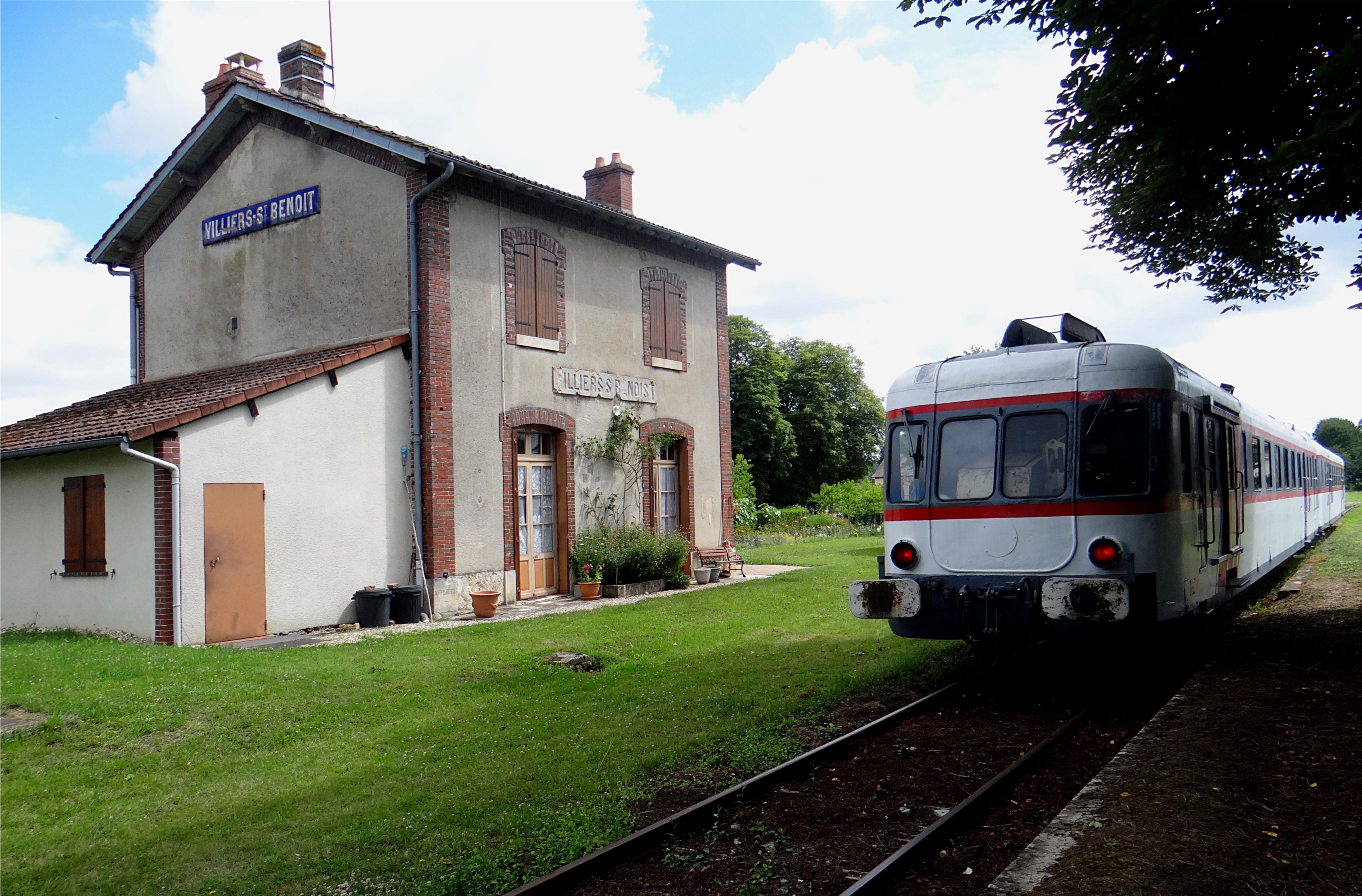 Gare de Villiers-Saint-Benoît et le train touristique, Yonne, France.